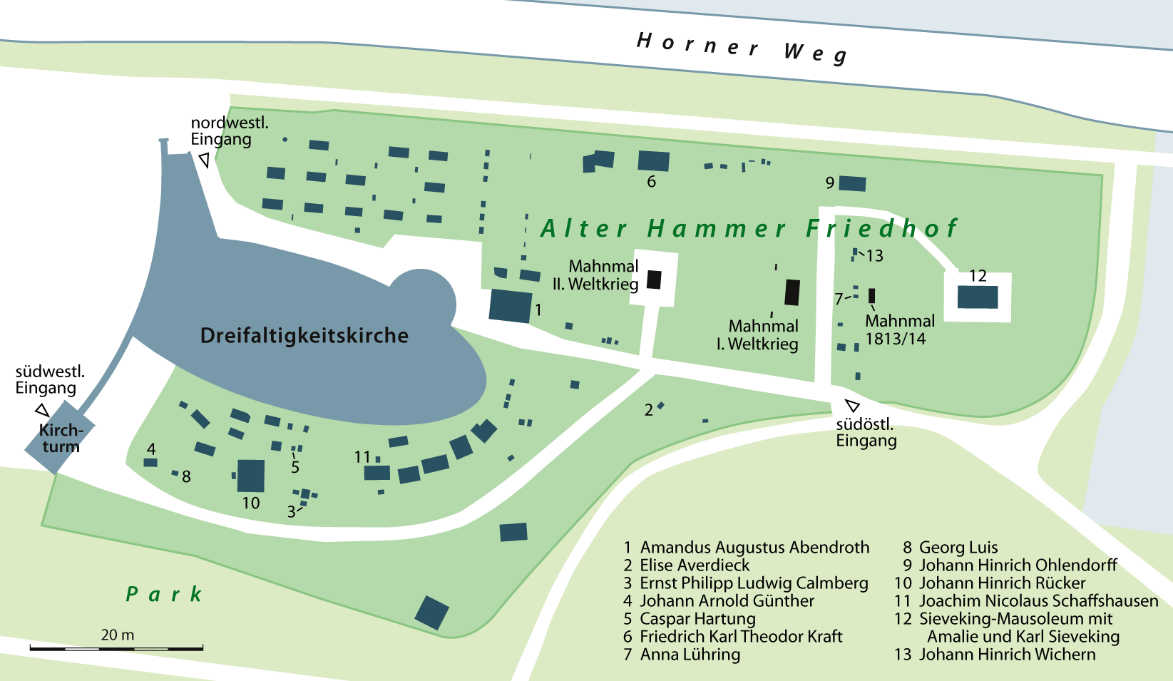 Plan des Alten Hammer Friedhofs in Hamburg-Hamm mit Lage ausgewählter Grabdenkmäler